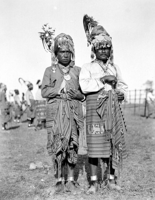 Negatief. Twee opgedofte notabelen van Amarasi